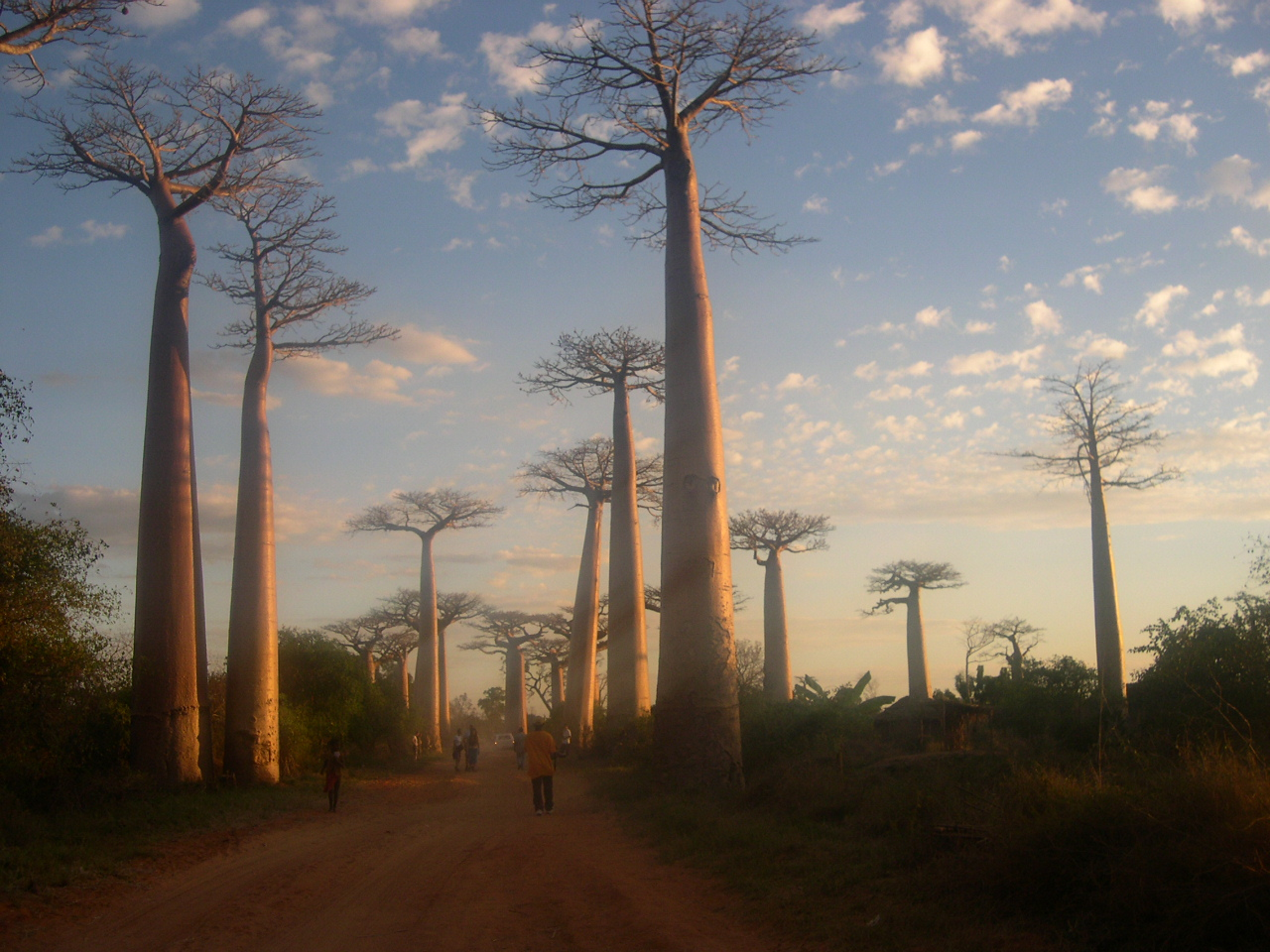 Baobab trees (Adansonia grandidieri)